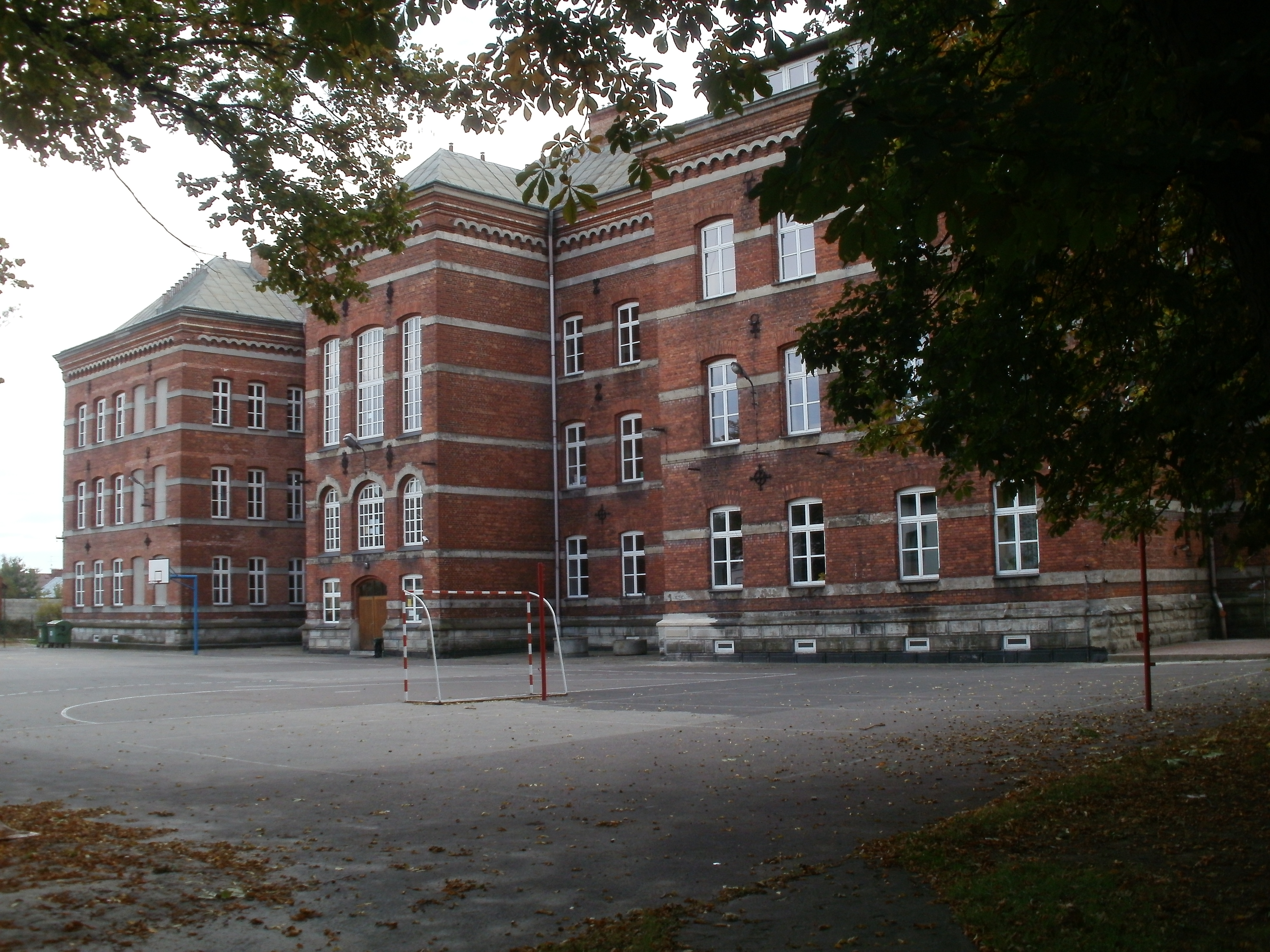 I Liceum Ogólnokształcące im. Seweryna Goszczyńskiego w Nowym Targu, widok od strony ul. Nadwodnej Nowy Targ, Pl. Krasińskiego 1, Nowy Targ